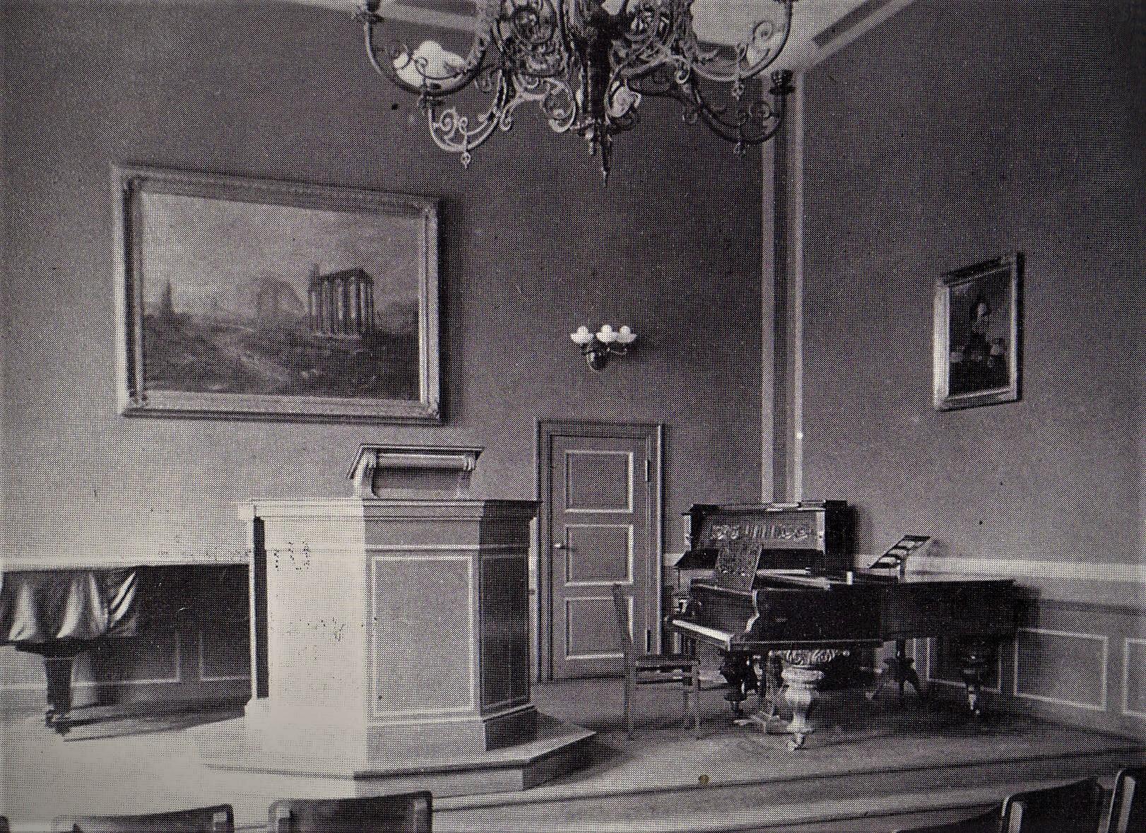 Aula des Gymnasiums Marienwerder